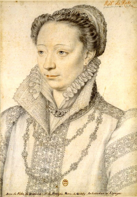 Claude Catherine de Clermont, duchesse de Retz ou Anne de Velez de Guevera. Recueil de portraits dessinés de la Cour de France